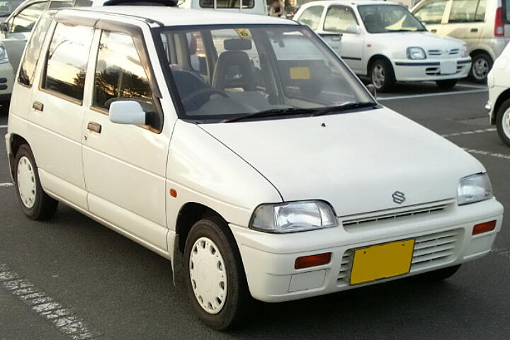 3代目スズキ・アルト（後期型）